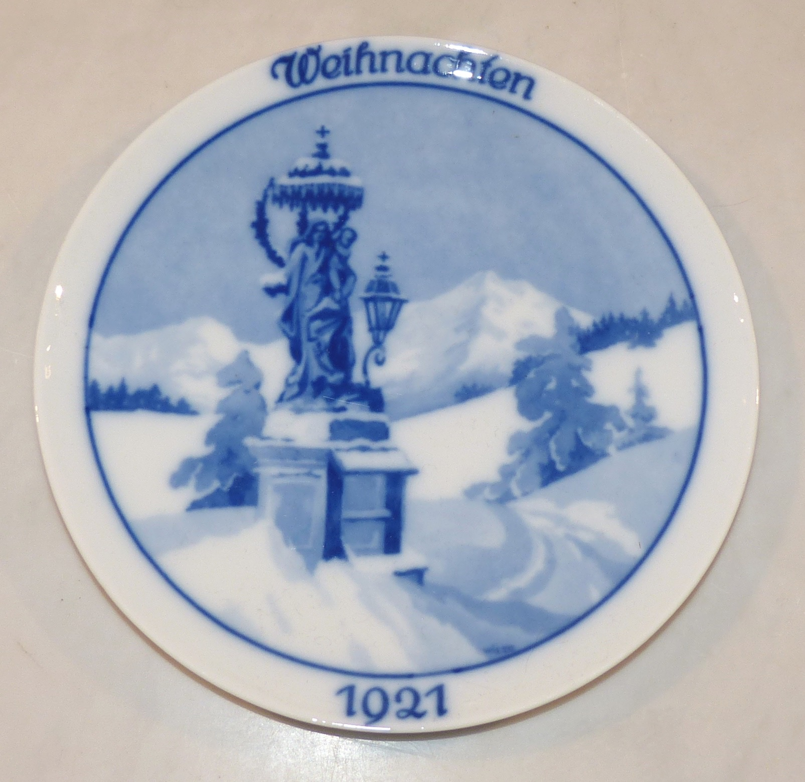 Rosenthal-Weihnachtsteller 1921: Entwurf Jupp Wiertz (1888-1939): Weihnachten im Gebirge